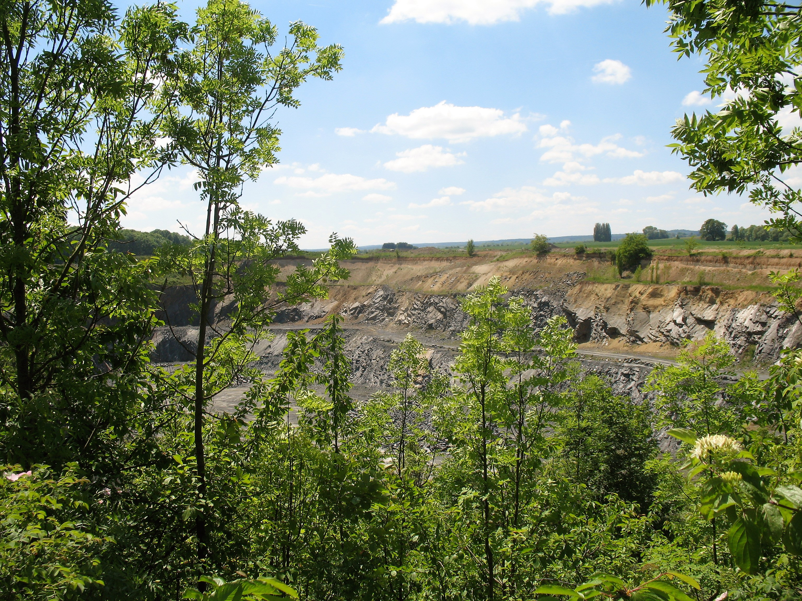 Lom Markovice, květen 2017